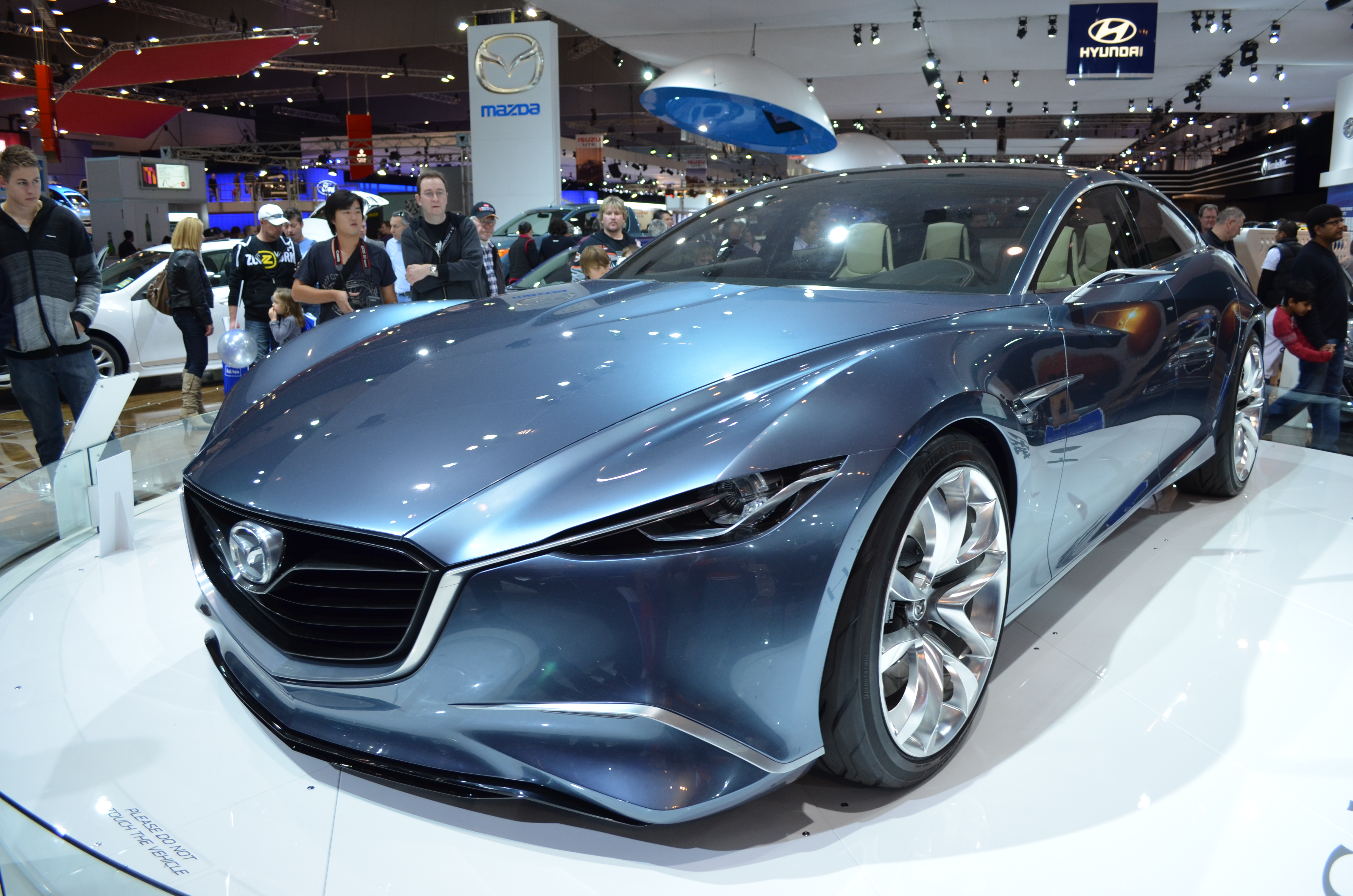 20110709_D5100 (307)